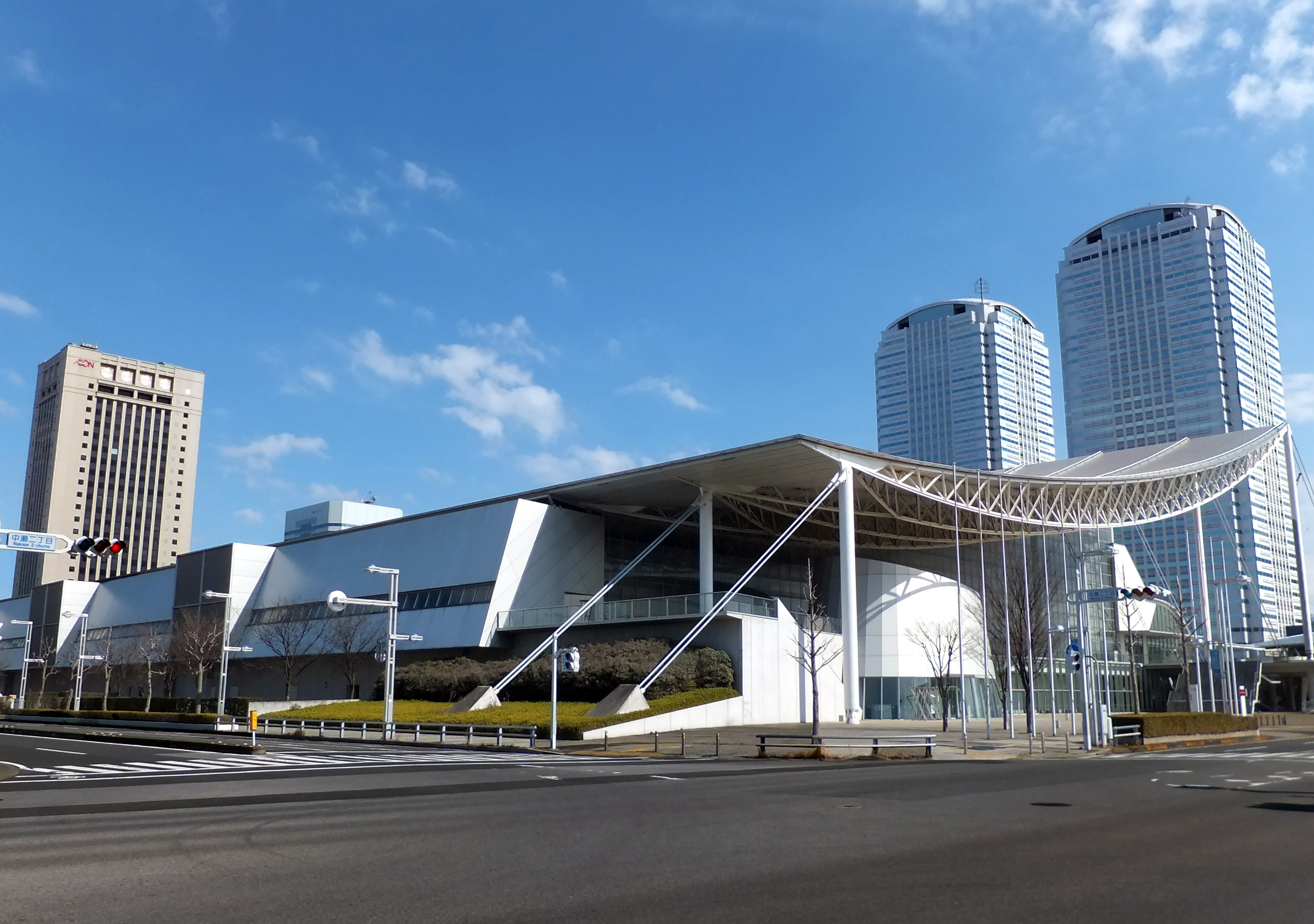 幕張メッセと幕張新都心の街並み